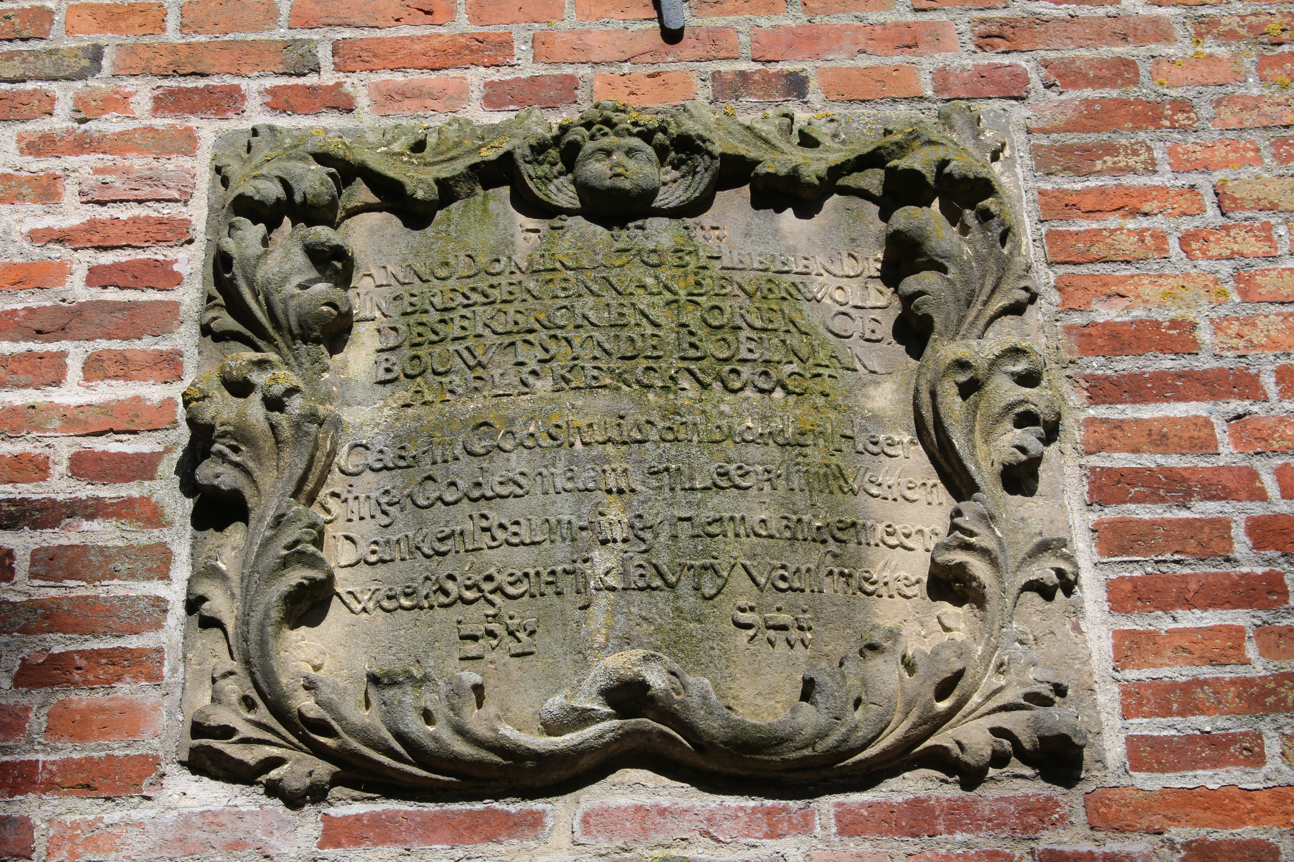 Ev.-reformierte Kirche Böhmerwold, Gemeinde Jemgum, Landkreis Leer, Ostfriesland, Deutschland